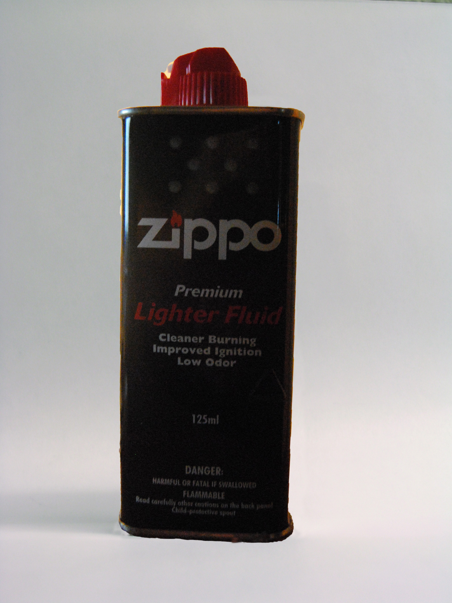 Bilde av en bensin flaske til en Zippo lighter